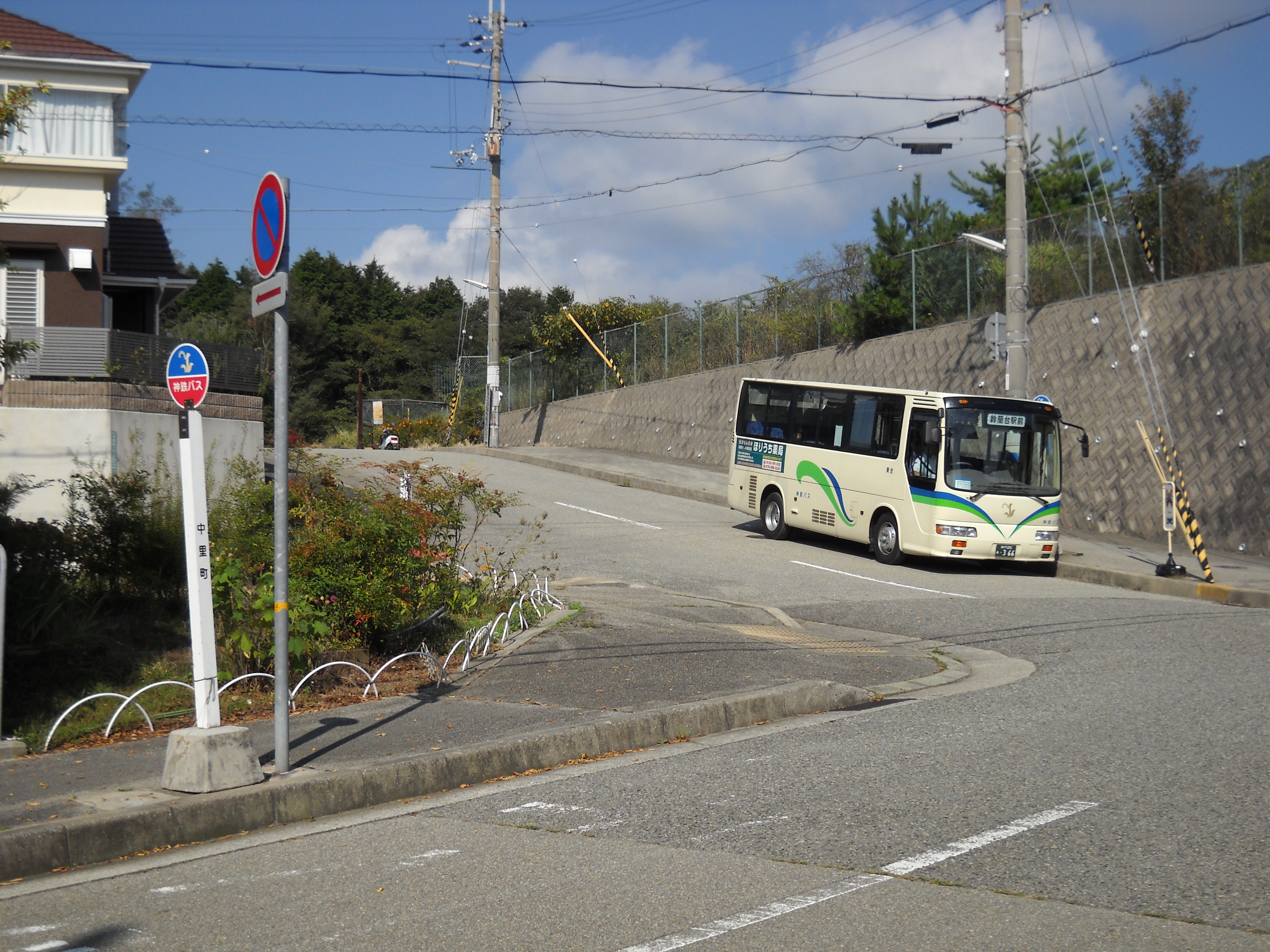 兵庫県神戸市北区中里町にて撮影。中里町バス停より鈴蘭台駅前ゆきが発車するところ。